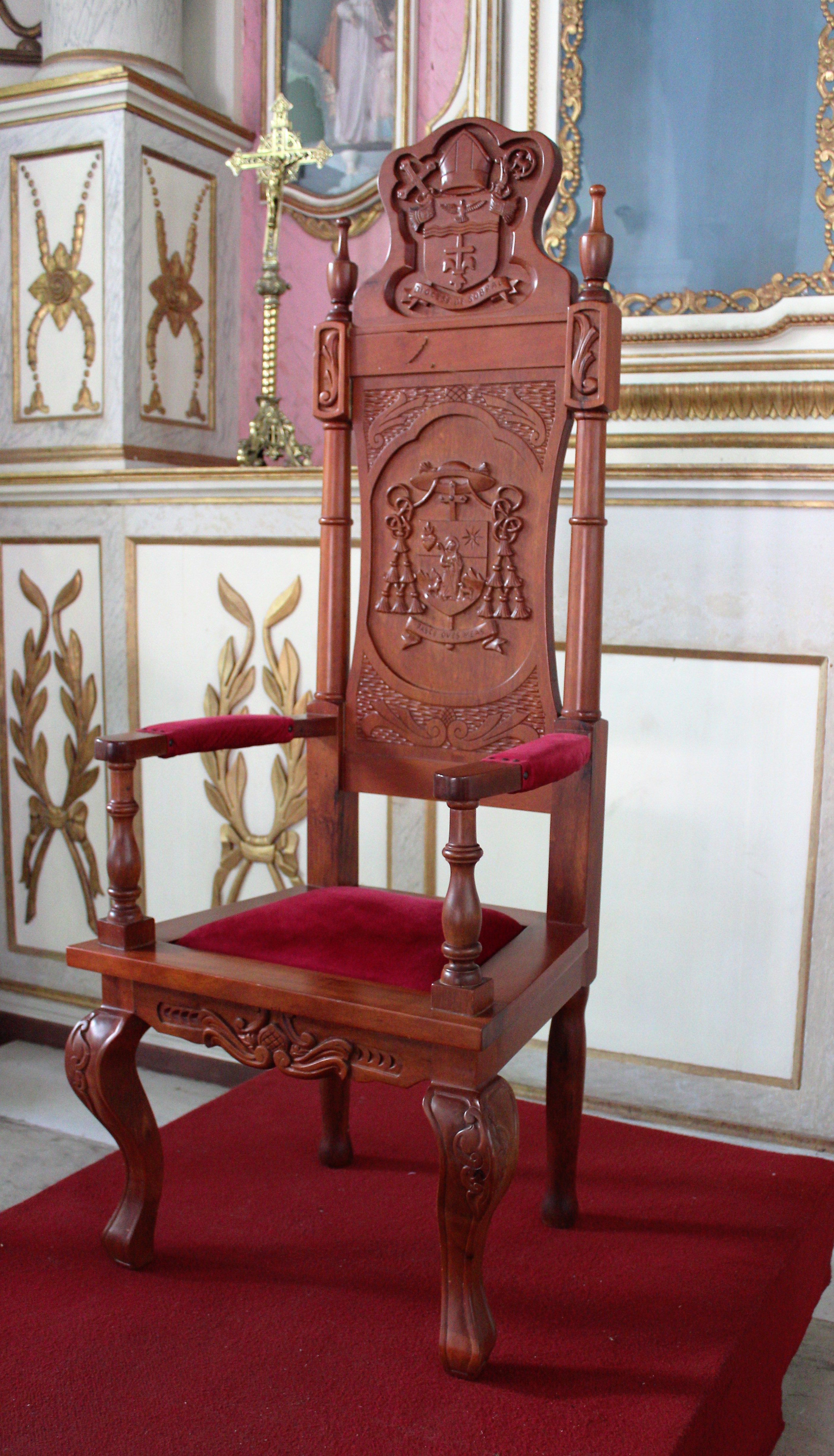 Linda, artística e heráldica cadeira tronal, em marcenaria, do Bispo de Sobral, no Ceará. Fica dentro da catedral de Sobral.